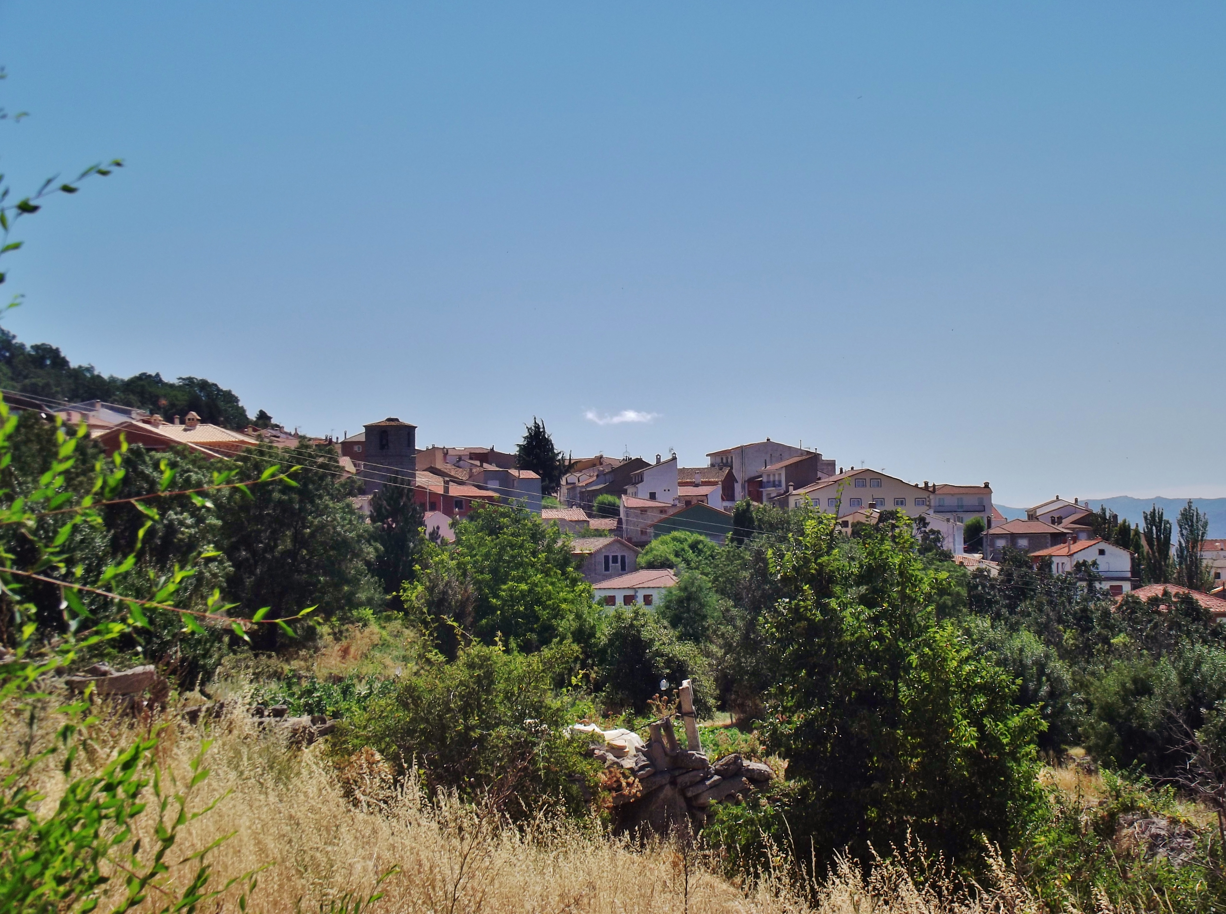 Vista de Hoyocasero